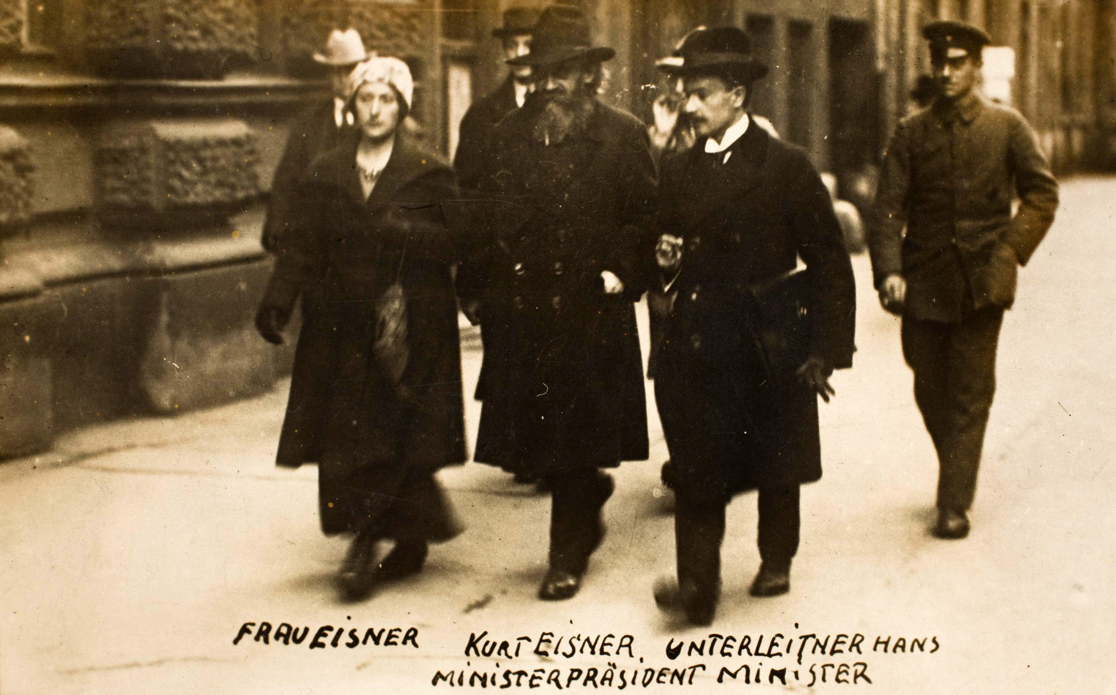 Bayerns Ministerpräsident Kurt Eisner mit Frau und Minister Unterleitner im Januar 1919.